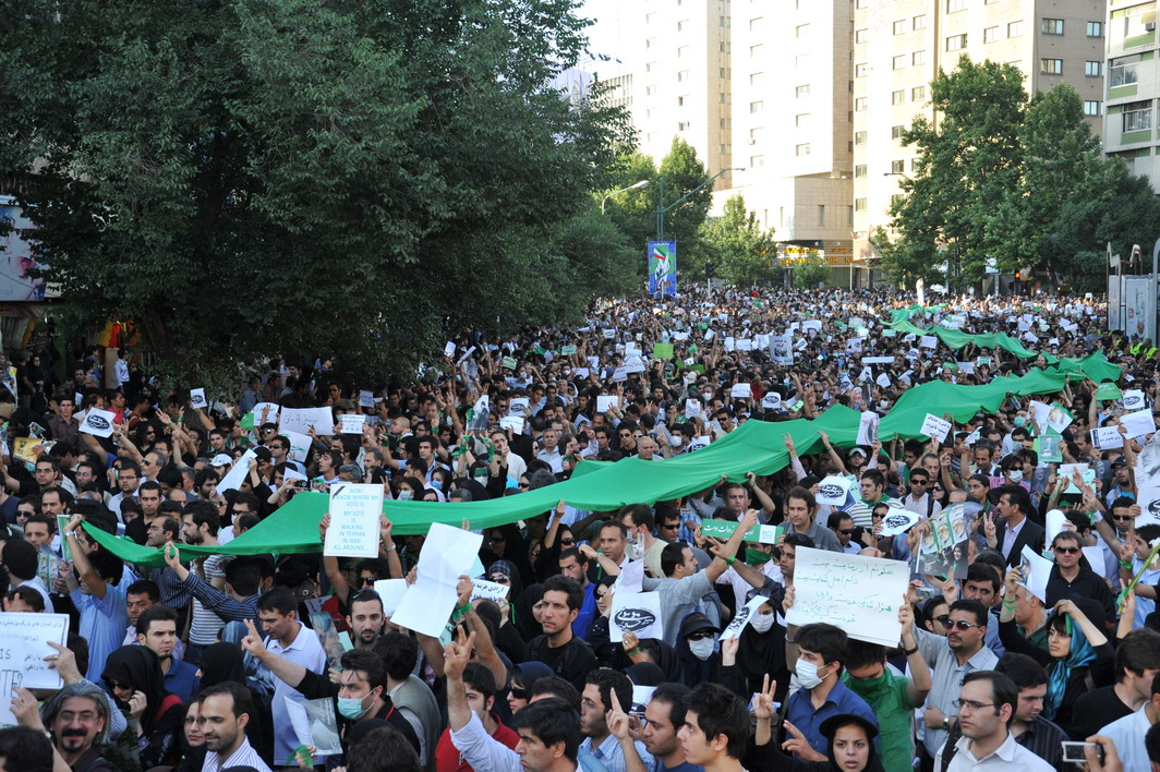 Protesters in Tehran, June 16